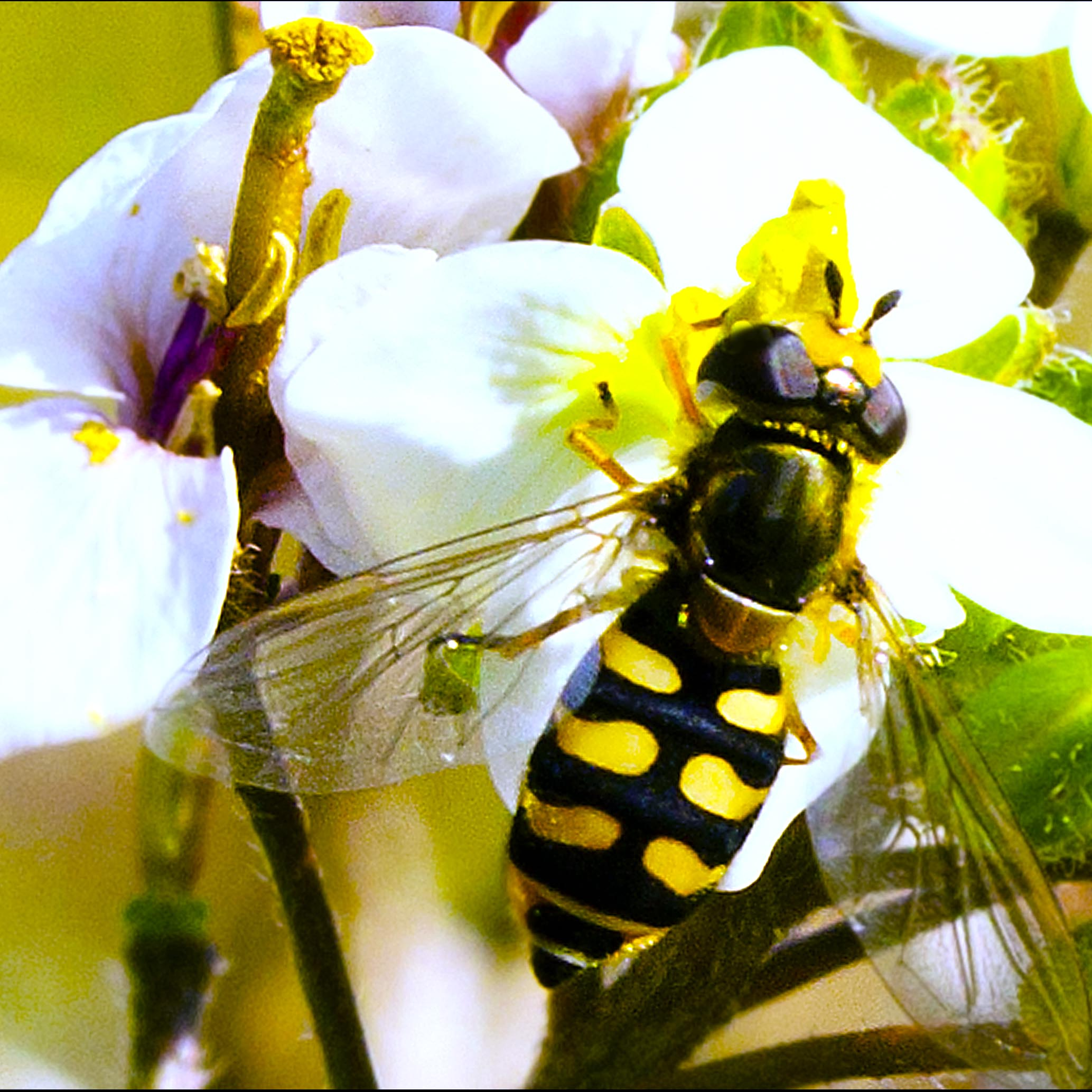 Sírfido recolectando néctar de una flor en Gironella, Berguedà